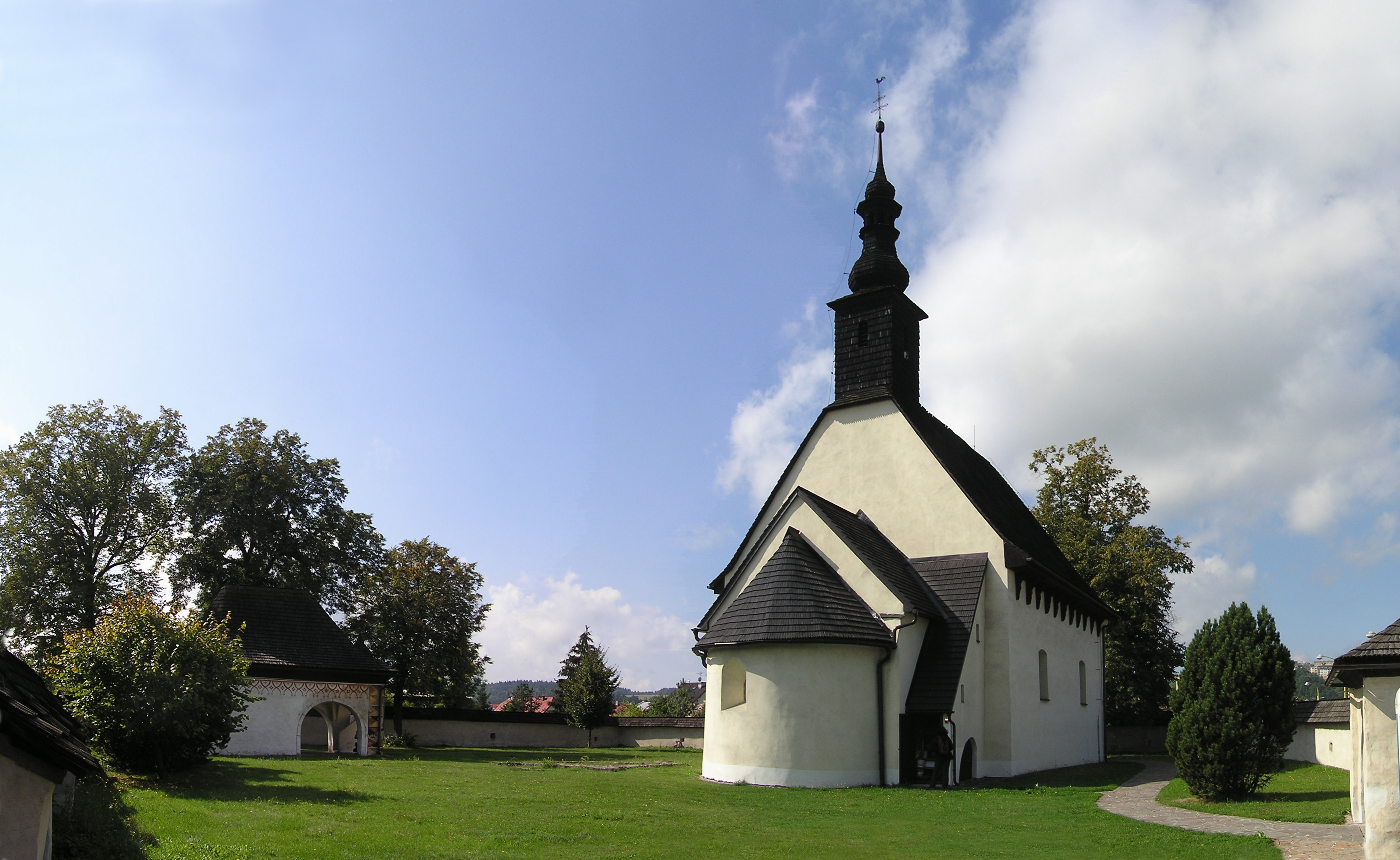 Kostol sv. Štefana, kráľa, Žilina.